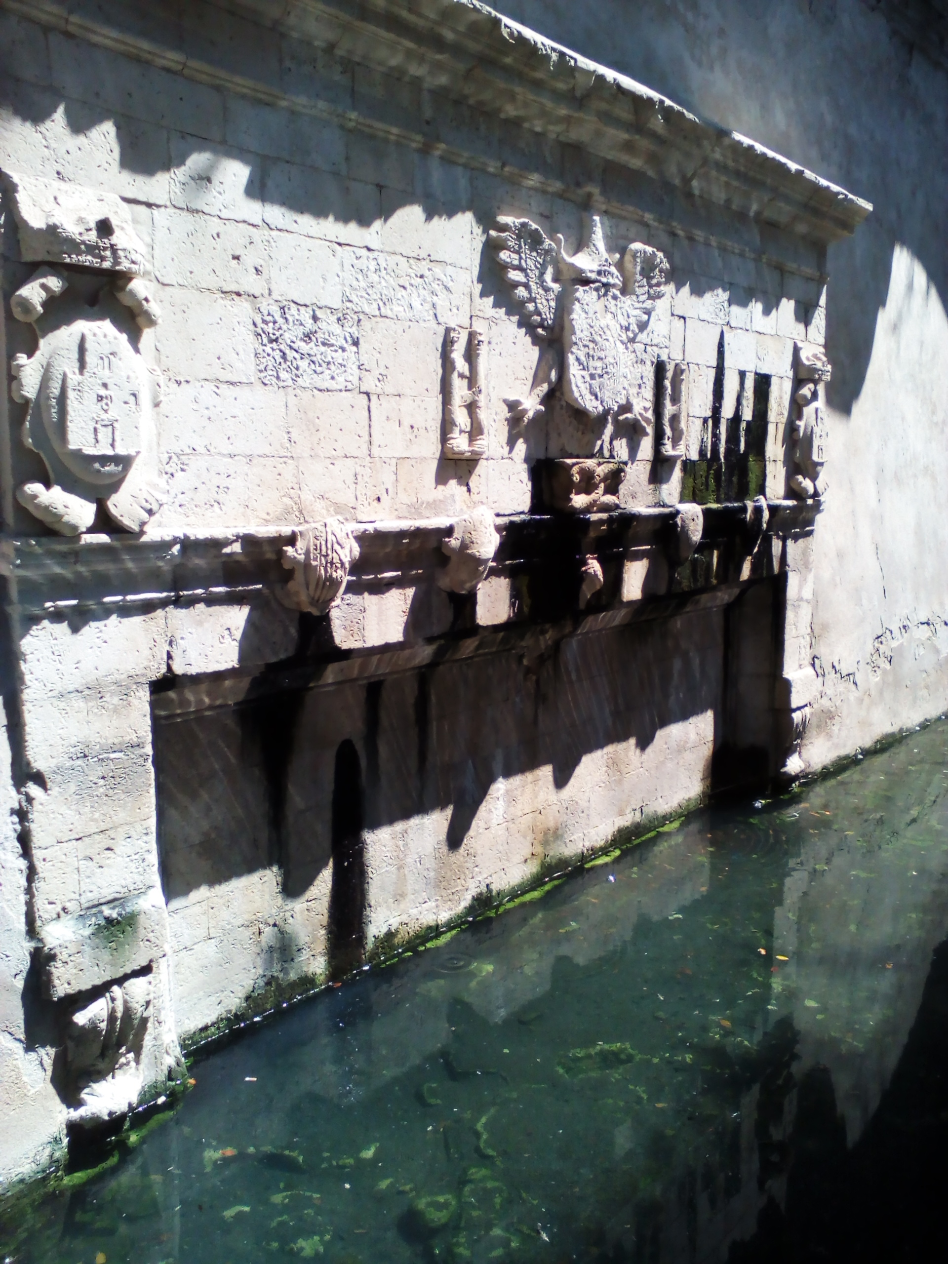 Fontana degli Schiavi, Ortigia, Siracusa